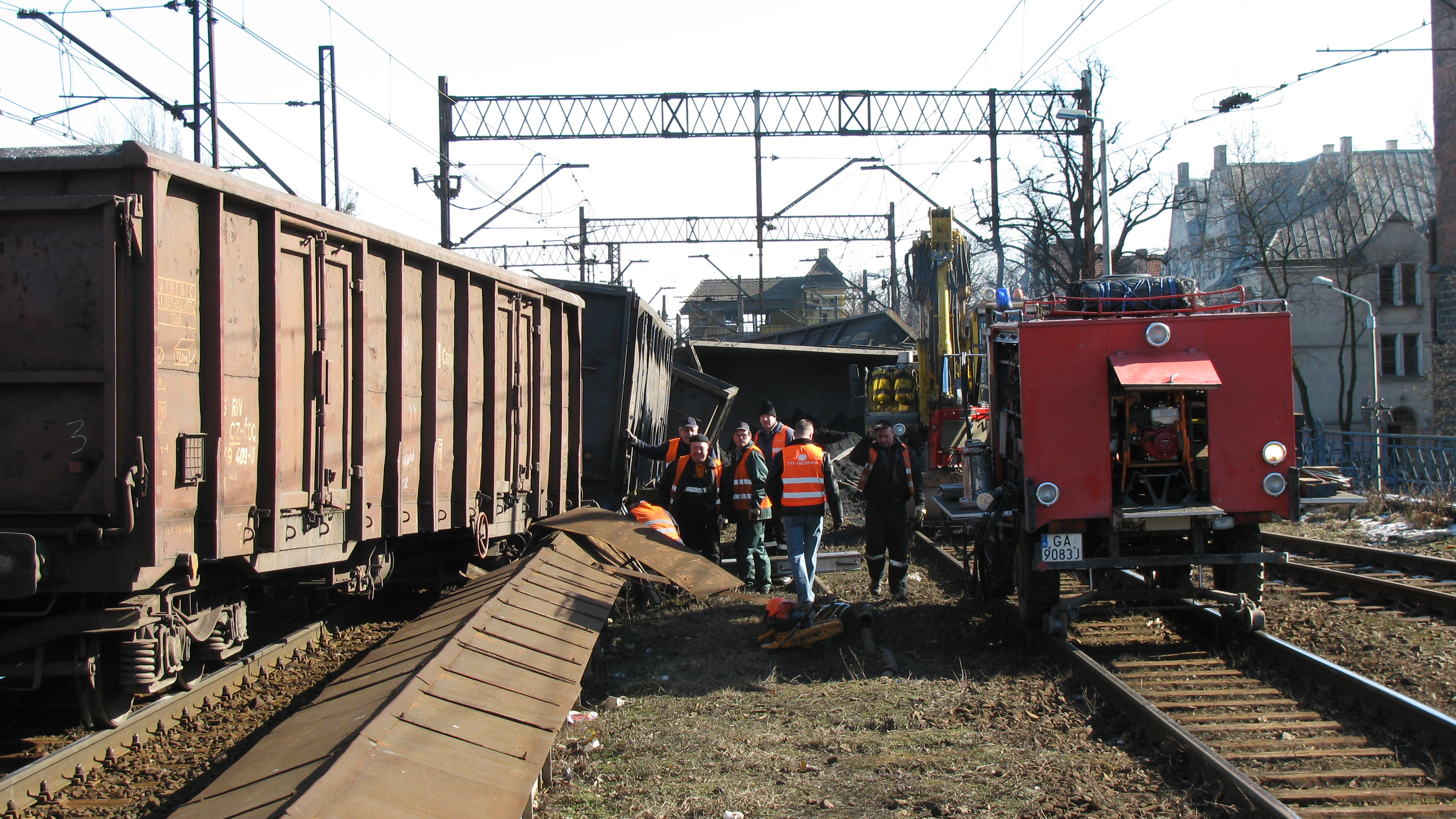 Wykolejony pociąg towarowy w Gdańsku Wrzeszczu, sfotografowany 7 marca 2011. Wykolejenie nastąpiło wieczorem, 6 marca 2011 (bez ofiar).